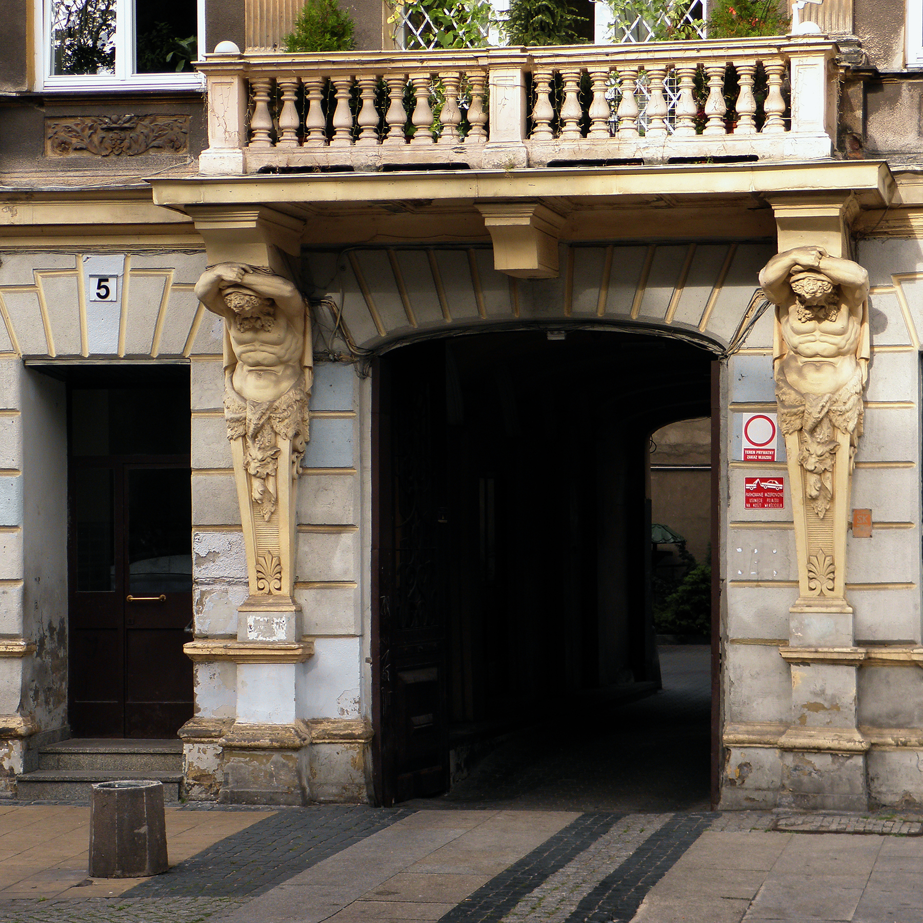 Radom - dawny pałac Karschów, brama.